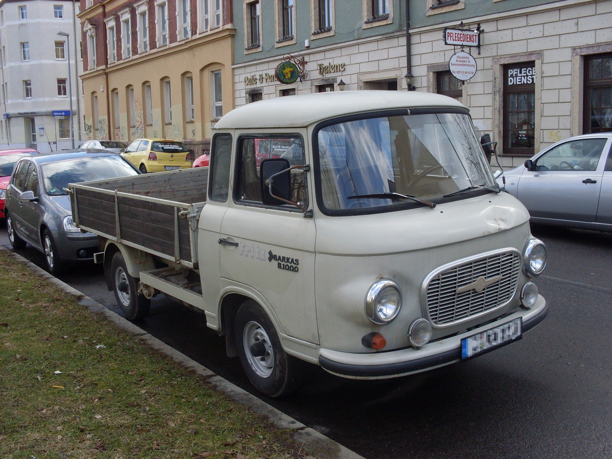 Barkas B 1000 in Chemnitz, 2010